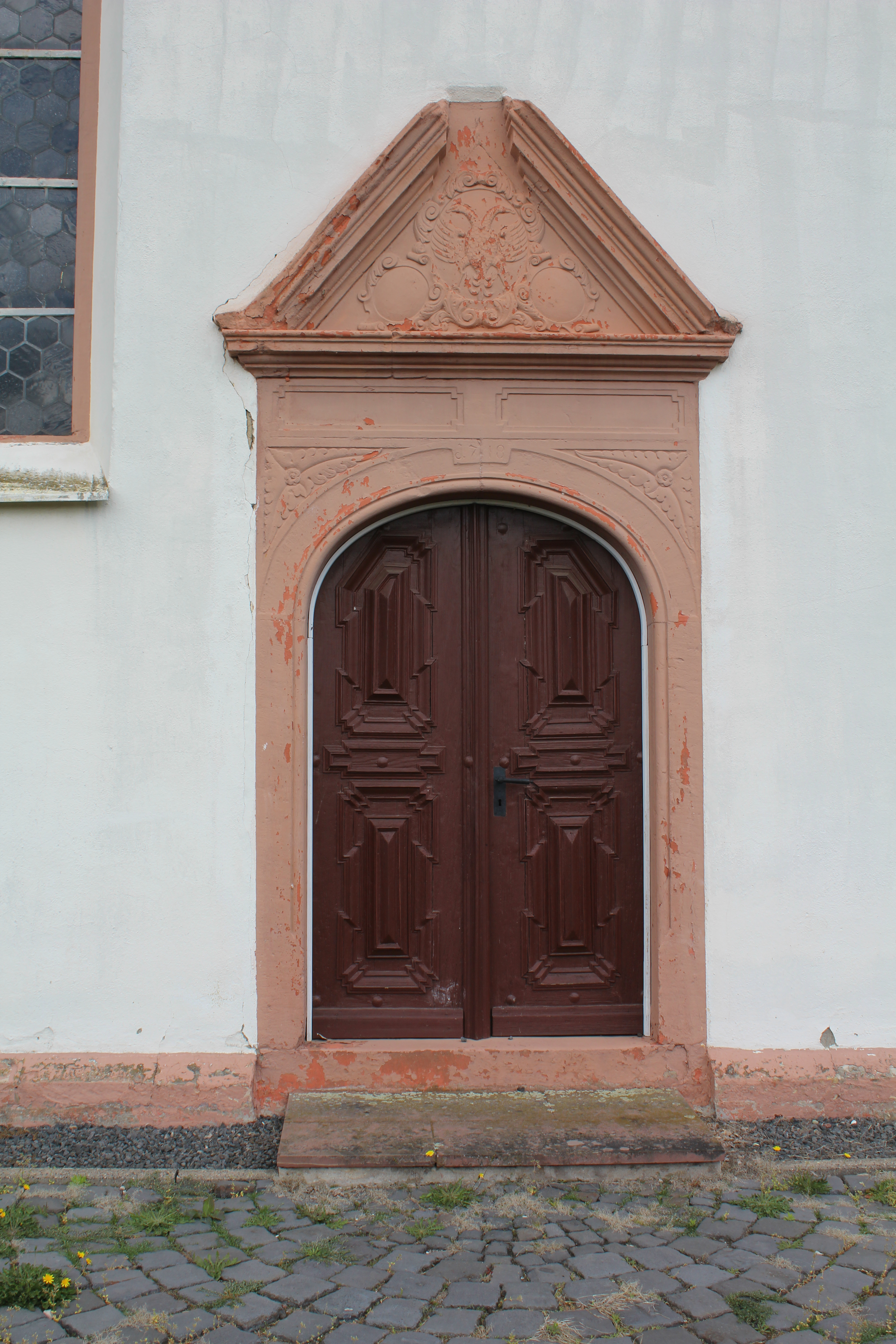 St. Nikolai, Altenstadt, Wetteraukreis, Hessen, Deutschland